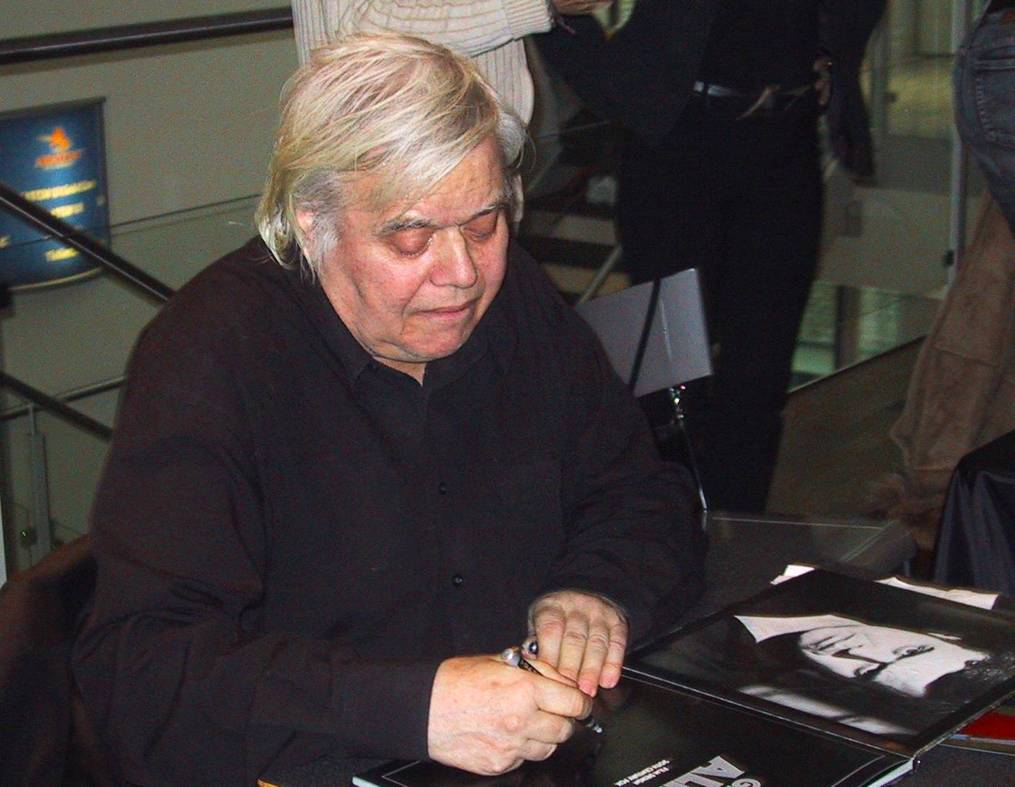 H. R. Giger